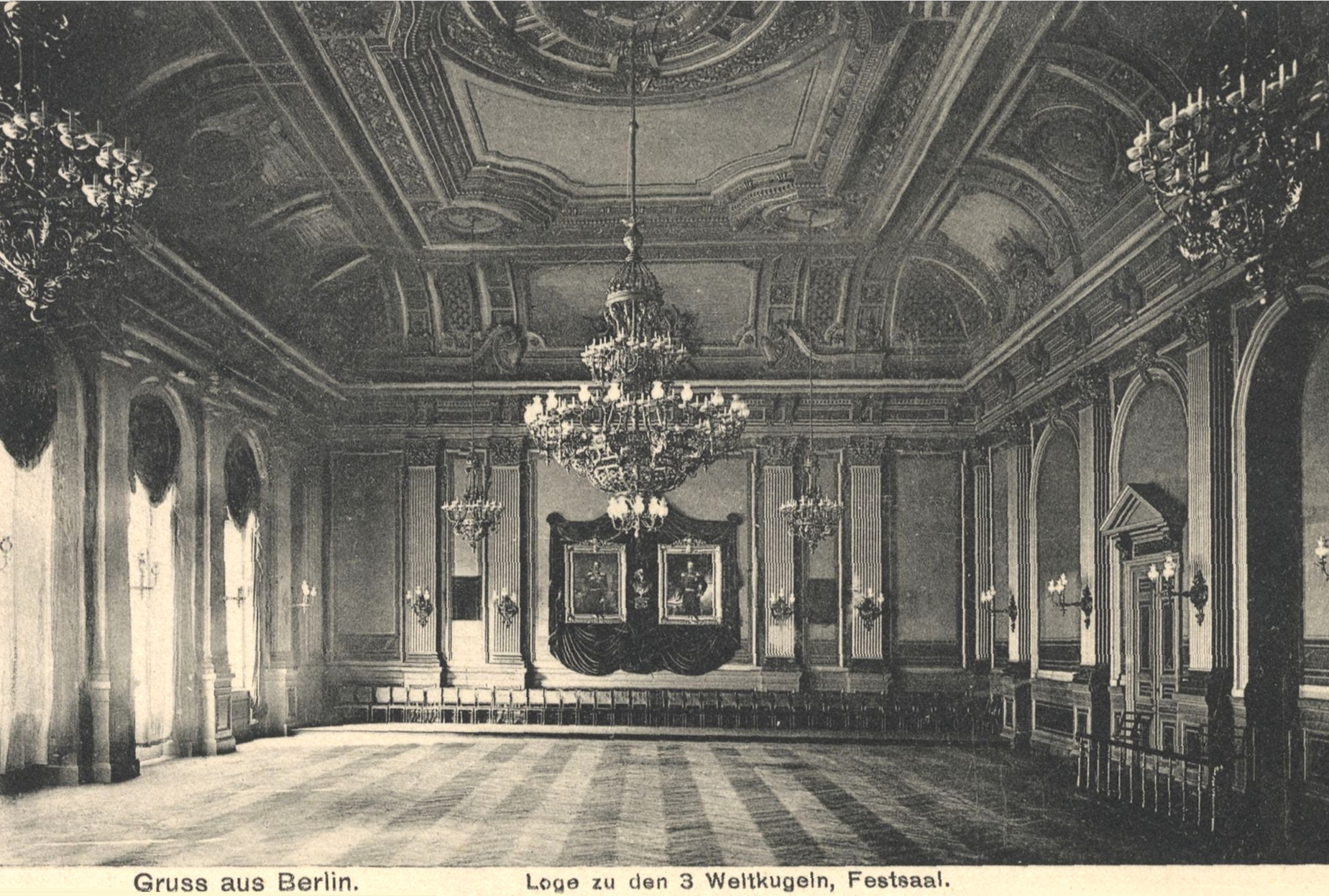 Festsaal im Freimaurer-Logen-Haus „Zu den 3 Weltkugeln“, Raules Hof Nr. 3, Berlin. Ansichtskarte nachbearbeitet: aufgehellt, gerade gerückt, beschnitten